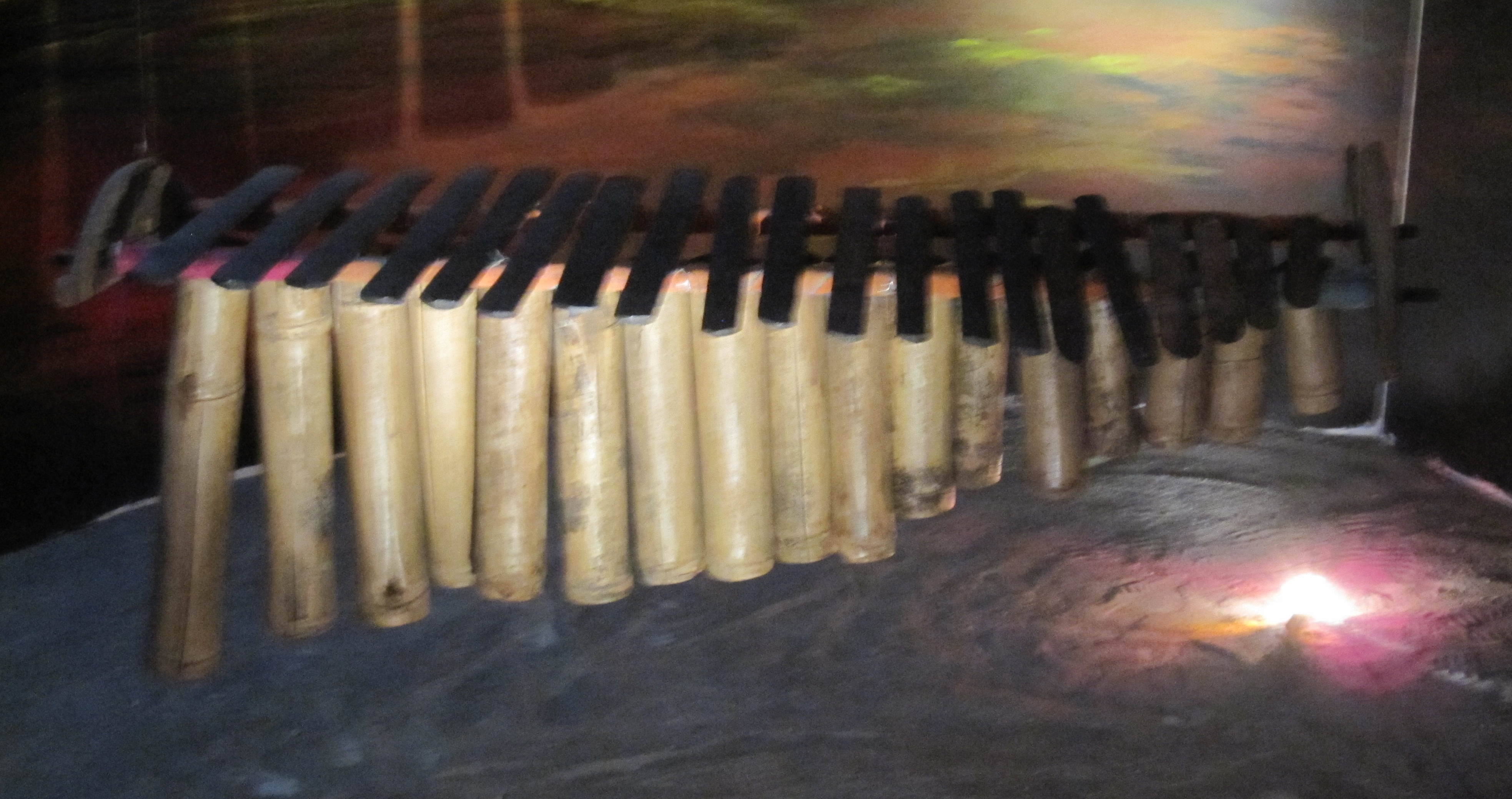 Esmeraldian (Afro-Ecuadorian) marimba